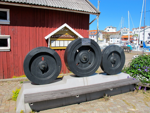 Monument över Skandiamotorns skapare Lars Laurin i Grundsund.